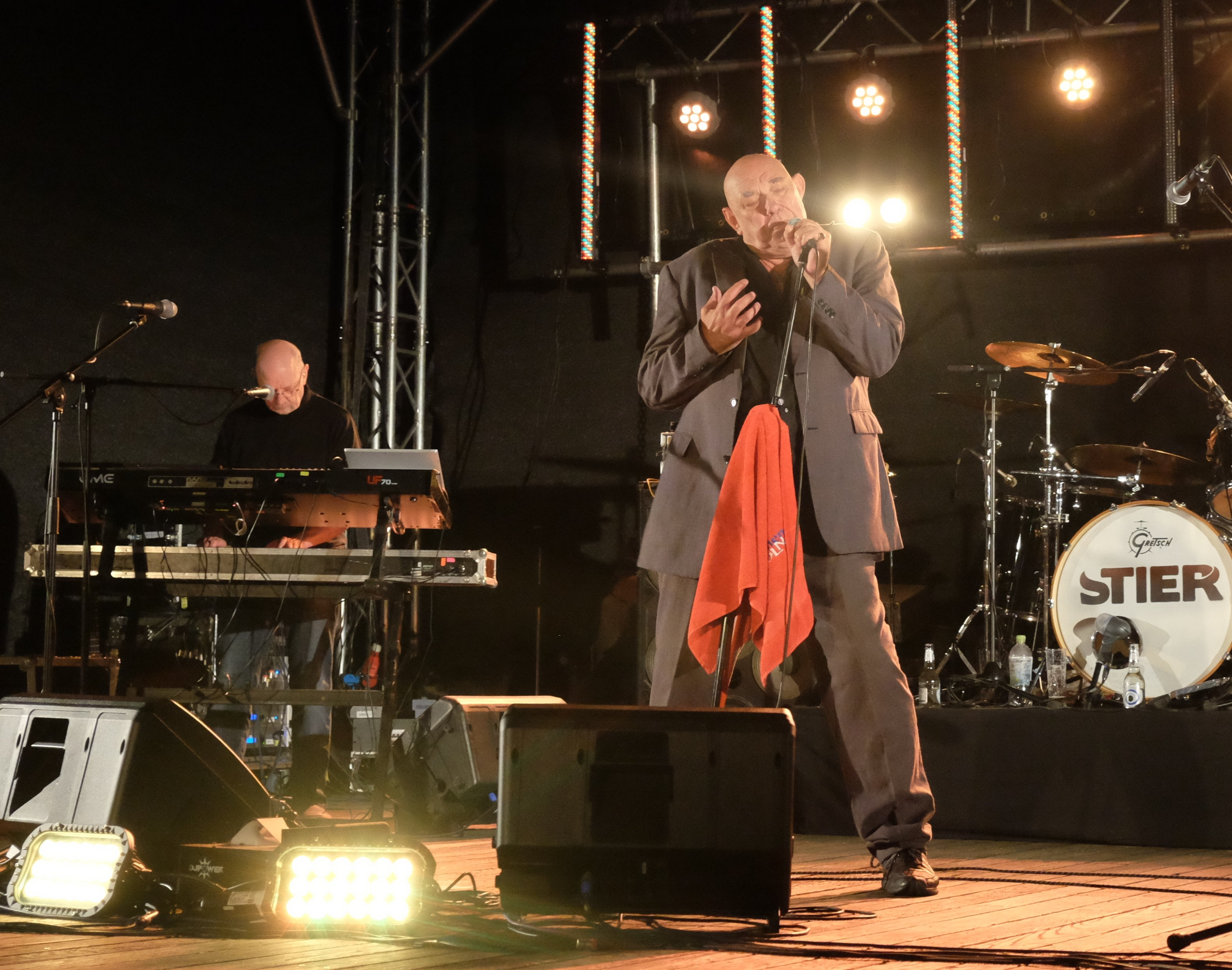 Stier Münster 2. September 2017